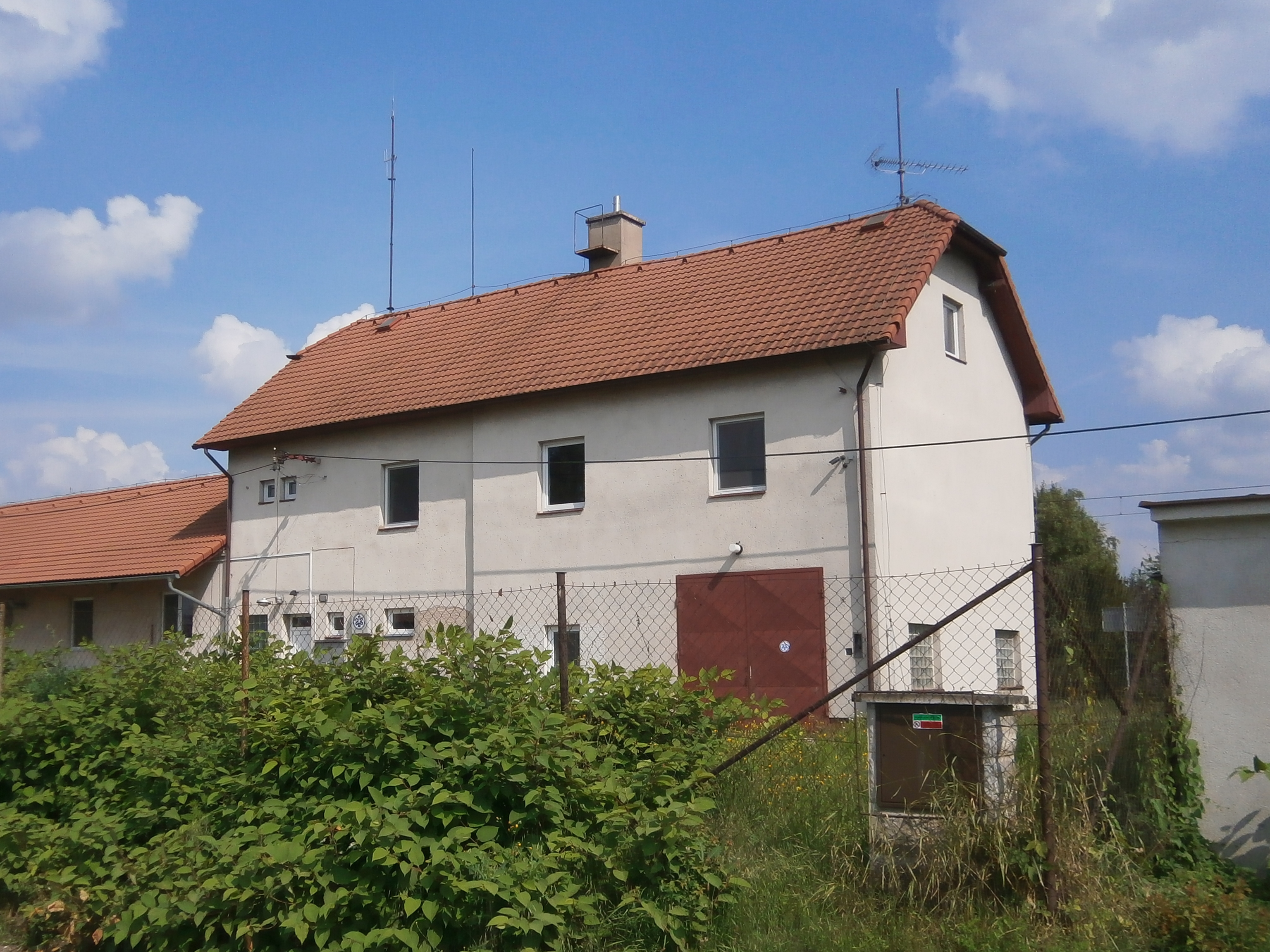 Železniční zastávka Hradec Králové-Kukleny.